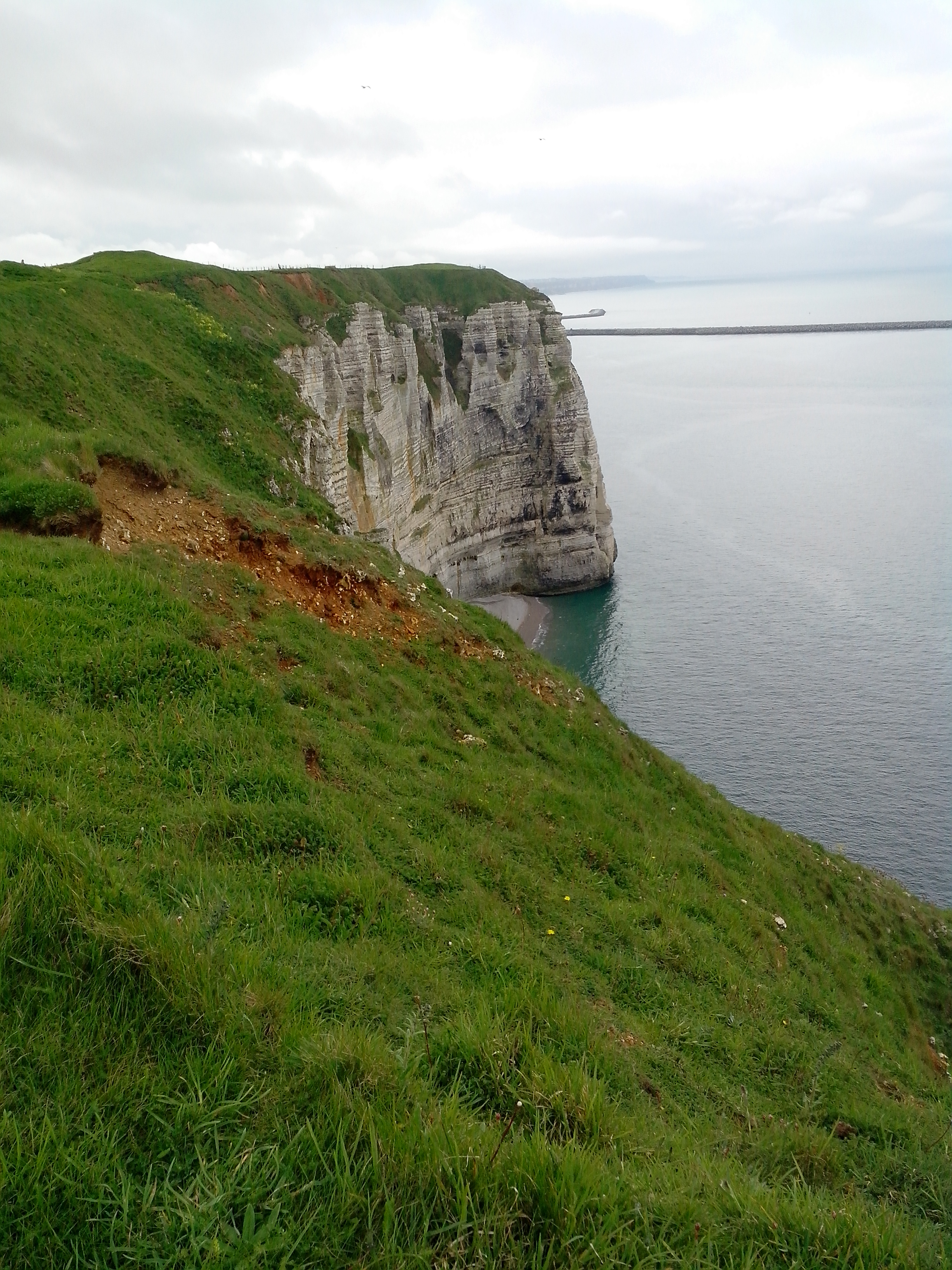 2013-05-08 Falaises, Cap d'Antifer, La Poterie-Cap-d'Antifer (76), France